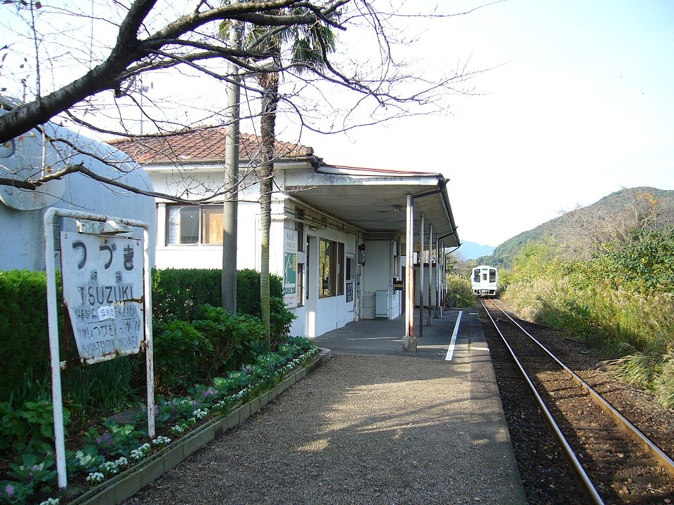 天竜浜名湖鉄道都筑駅 ホームを西望 2006年11月22日 Bakkai撮影